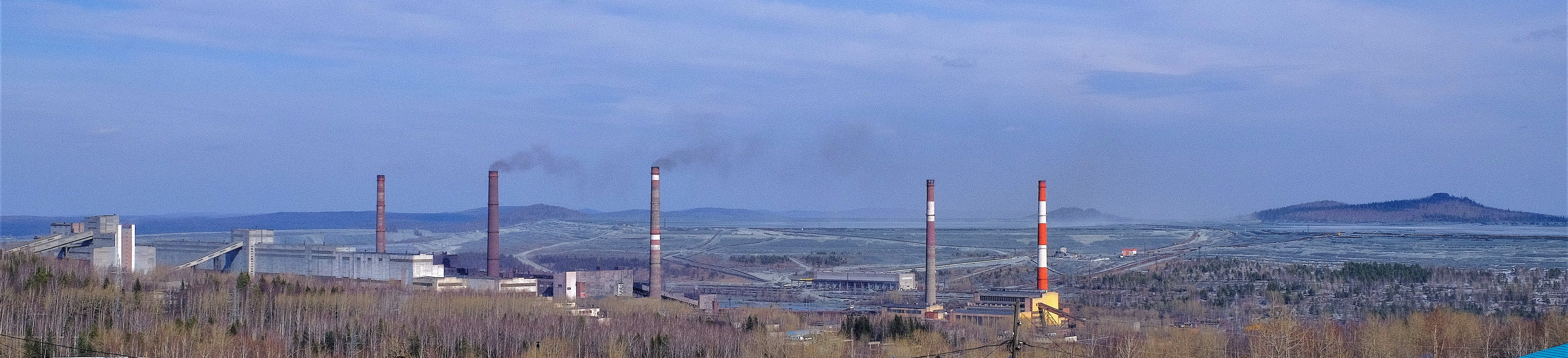 Вид на промплощадку Качканарского ГОКа